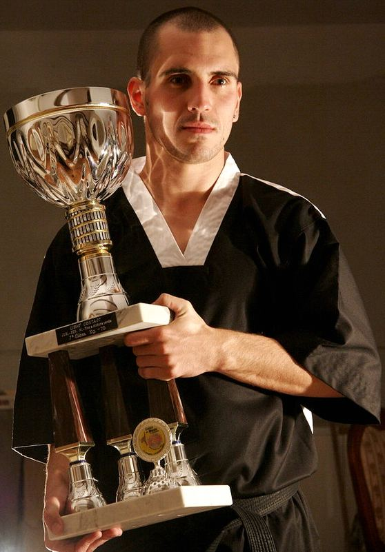 Wojciech Ołtarzewski_2